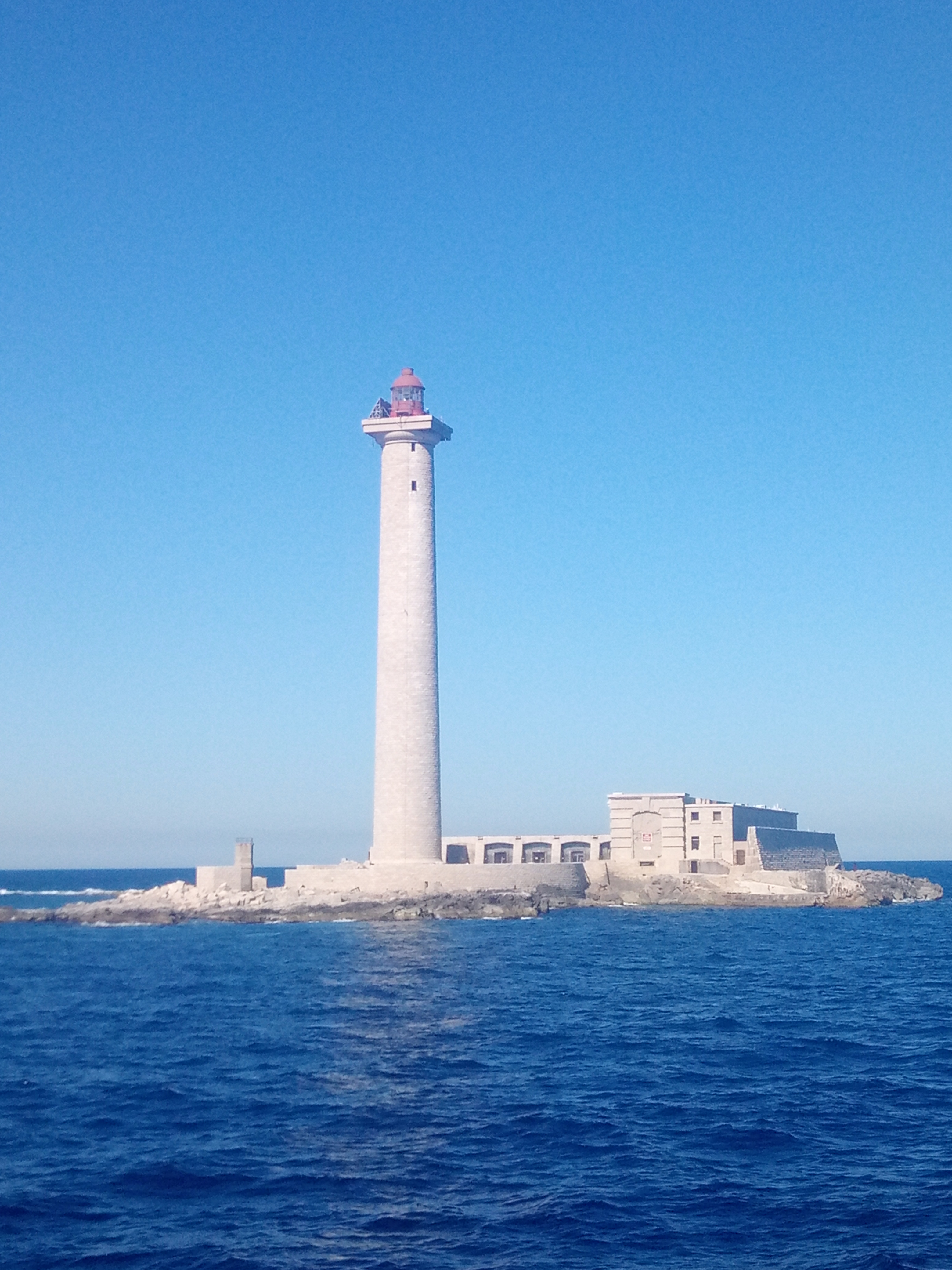 Illon de Planiá vist despuei la mar